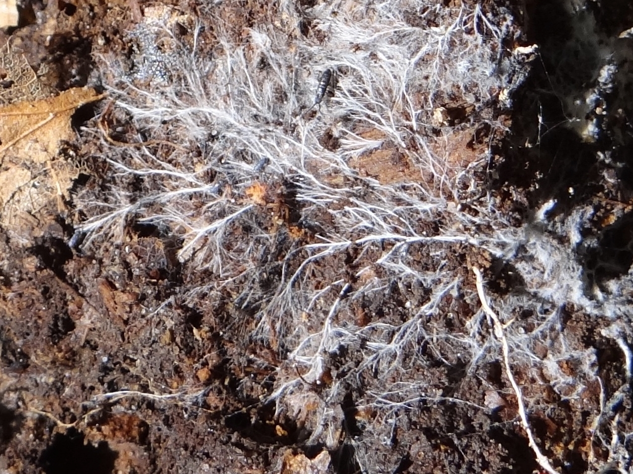 Hyphae